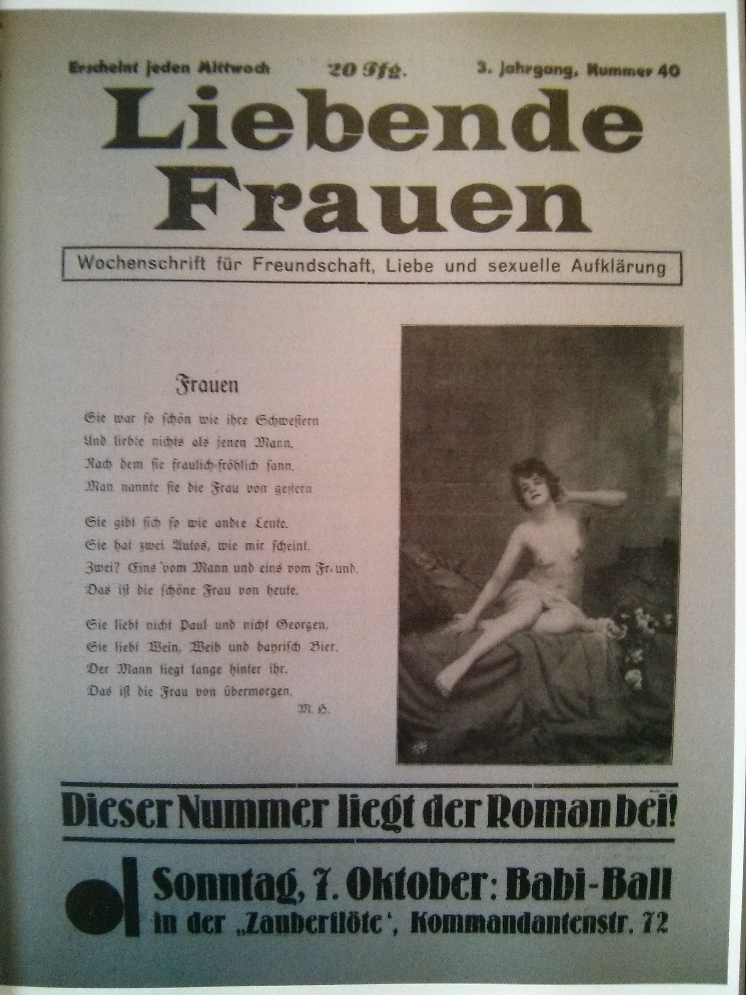 Aus der lesbischen Zeitschrift "Liebende Frauen", Berlin, 1928, Titelblatt Ausgabe 40